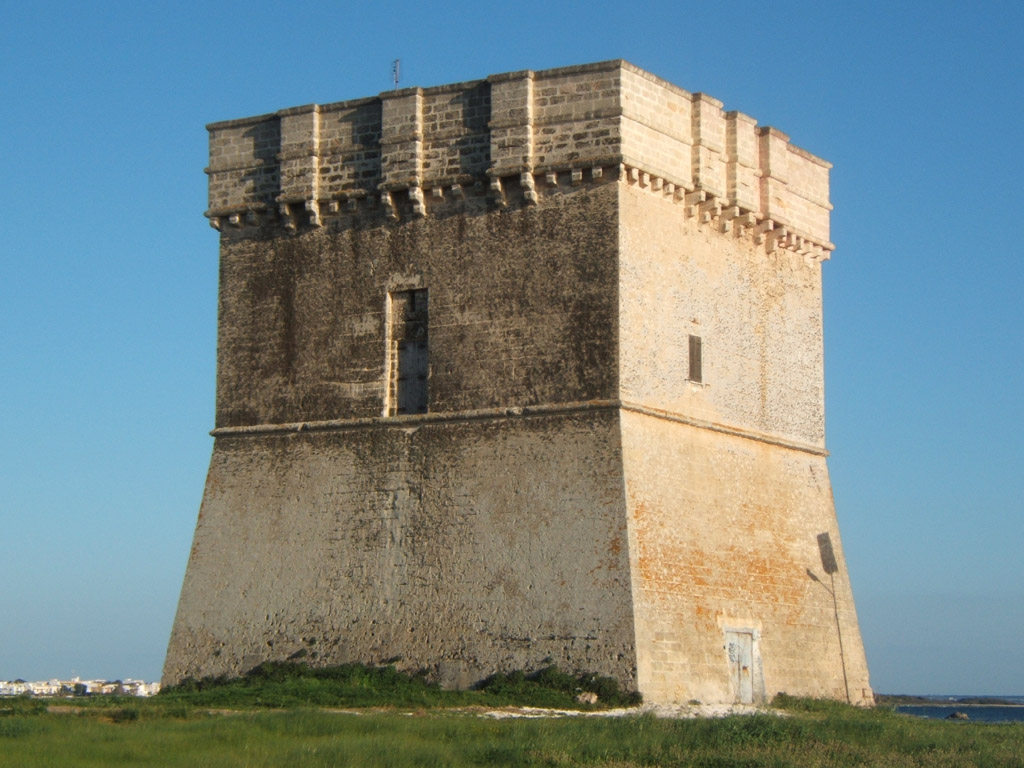 Torre chianca si trova qui 40°16′18″N 17°52′14″E / 40.27167°N 17.87056°E